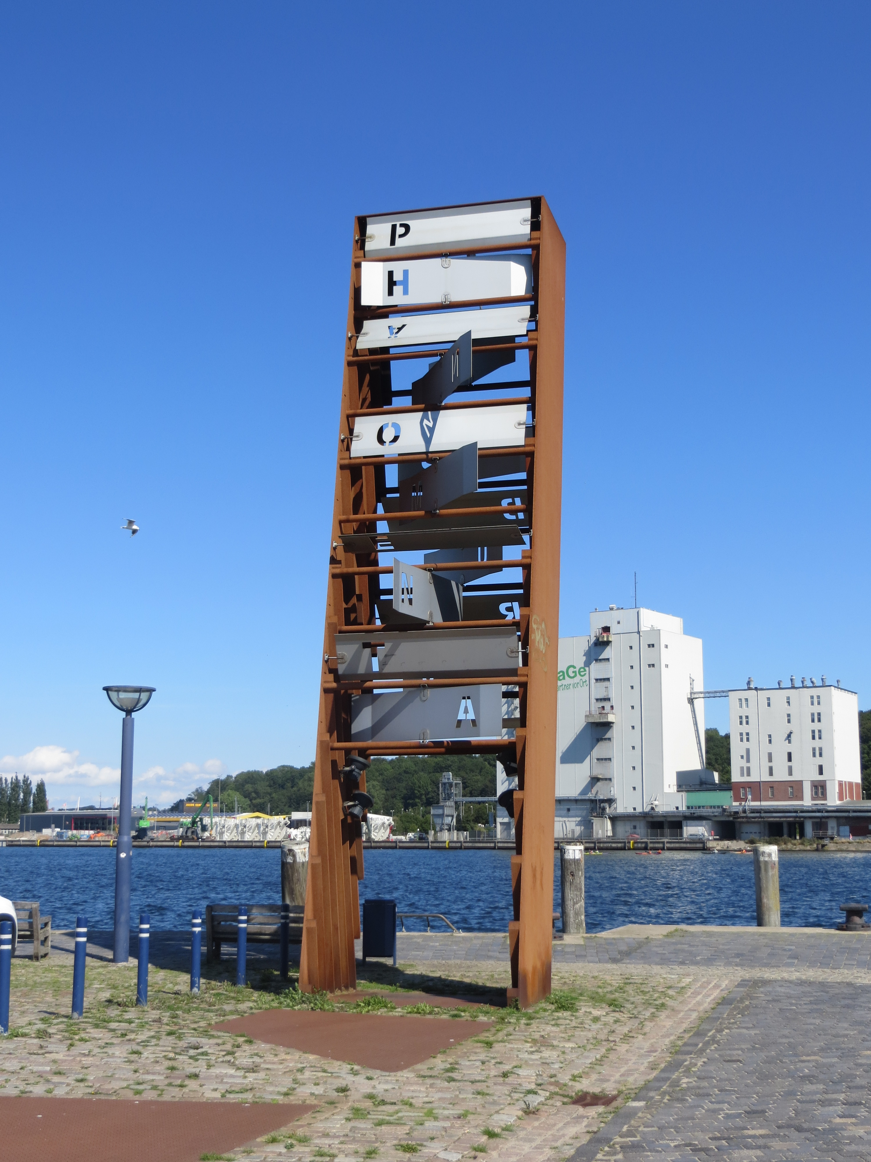 Phänomenta-Drehgebilde am Flensburger Hafen; dreht sich im Wind